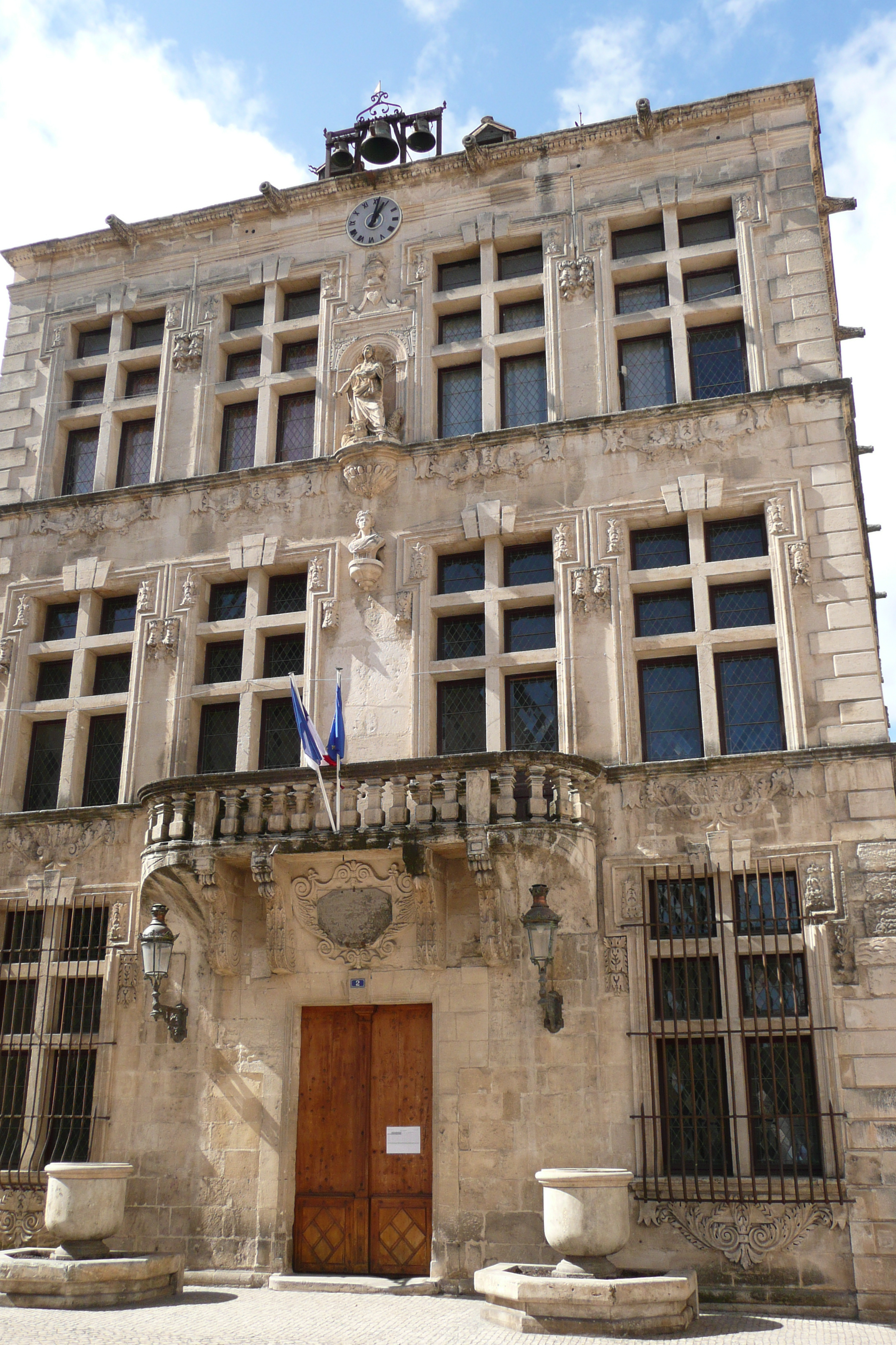 Tarascon.